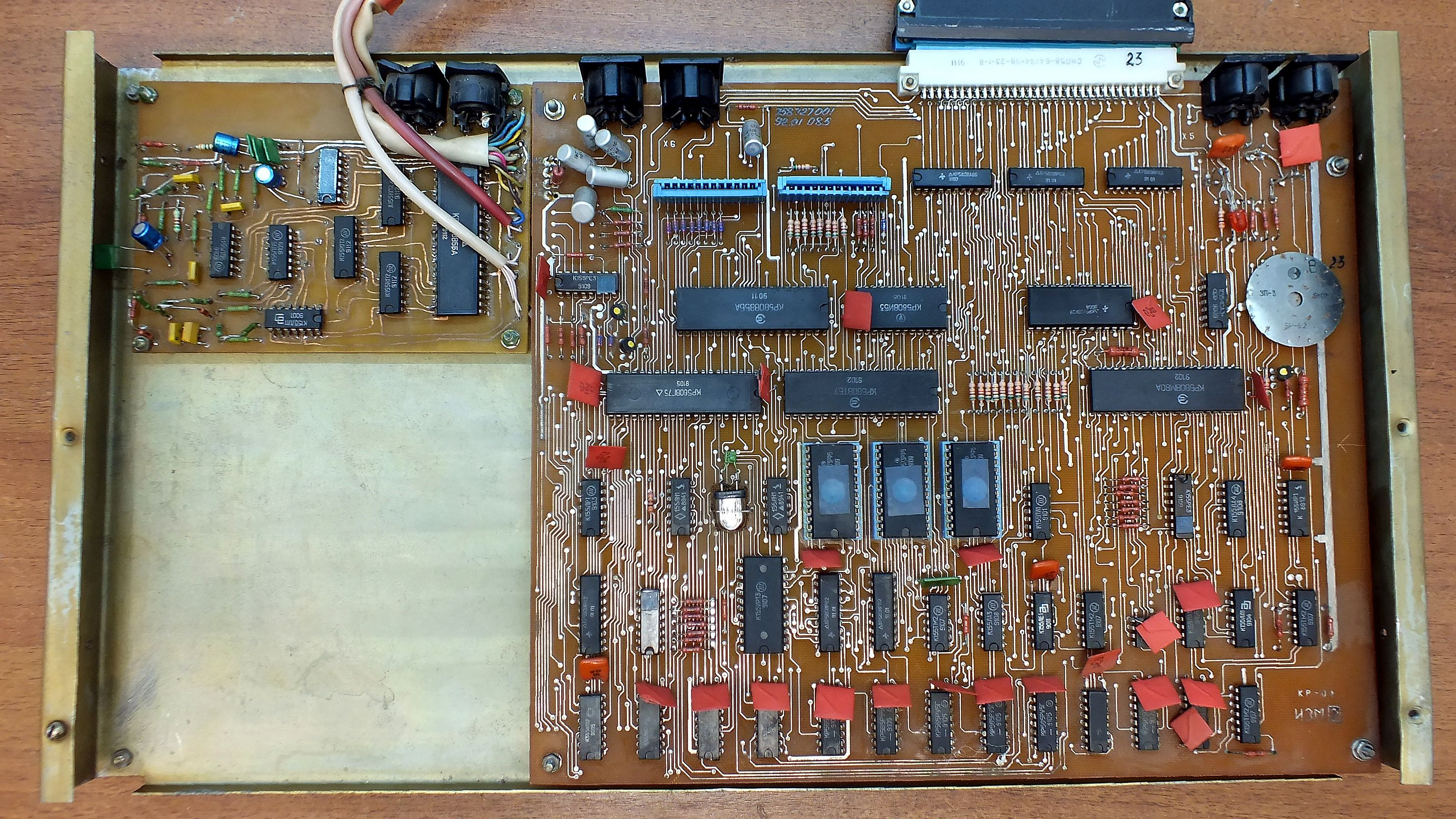 Изображен компьютер Электроника КР-04 со снятой клавиатурой.